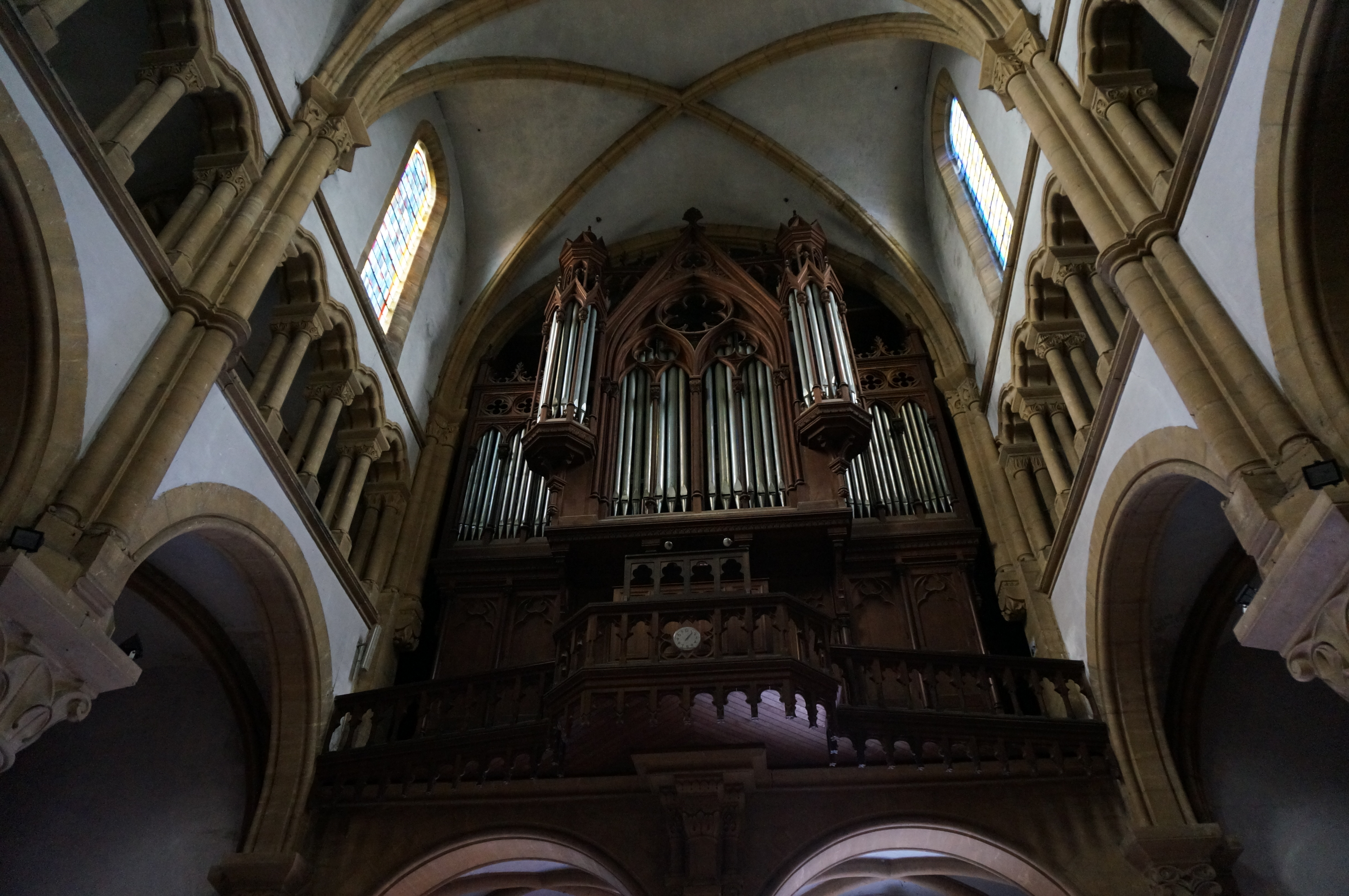 Orgue de tribune construit par la manufacture Pierre Schyven de Bruxelles.